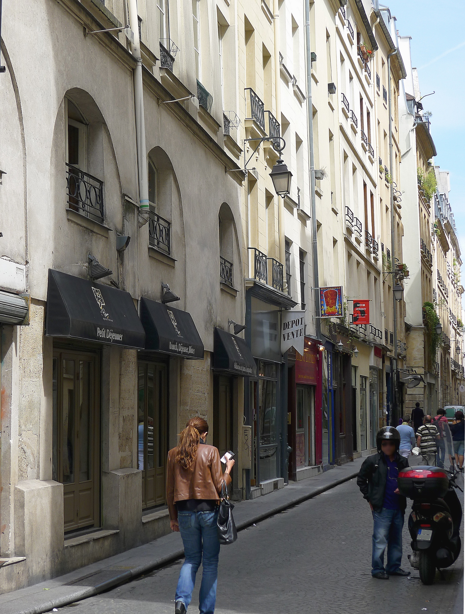 Rue Saint-Sauveur - Paris II